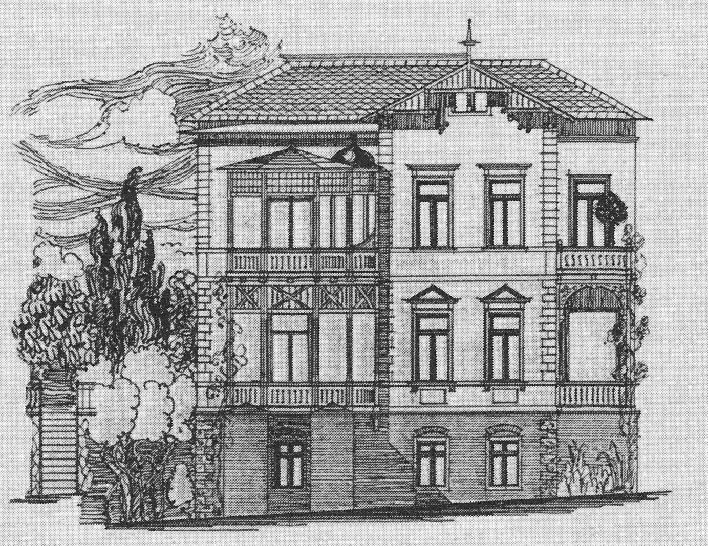 Radebeul, Villa Hohe Straße 45, Bauzeichnung 1895